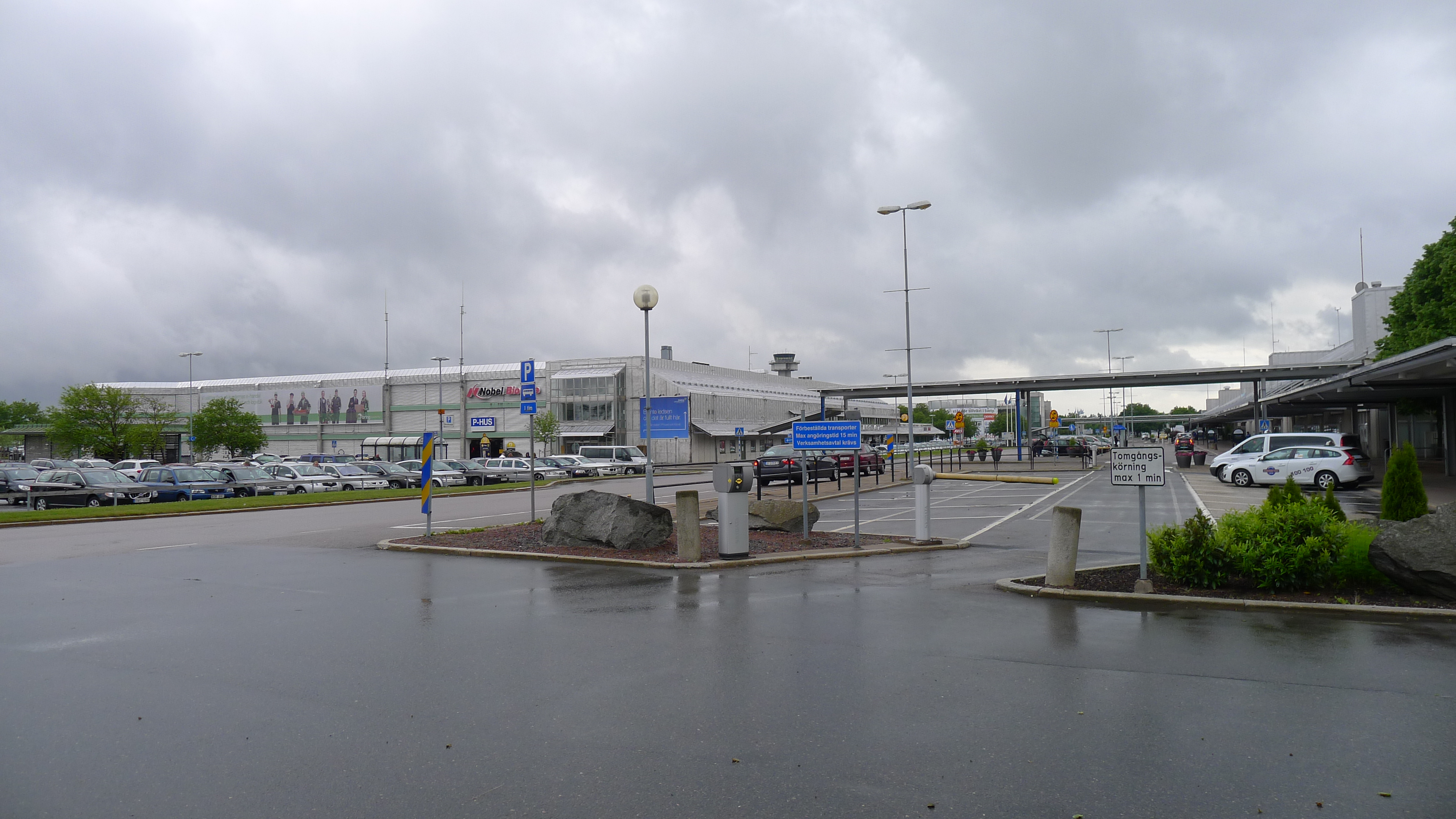 Gothenburg-Landvetter Flughafen